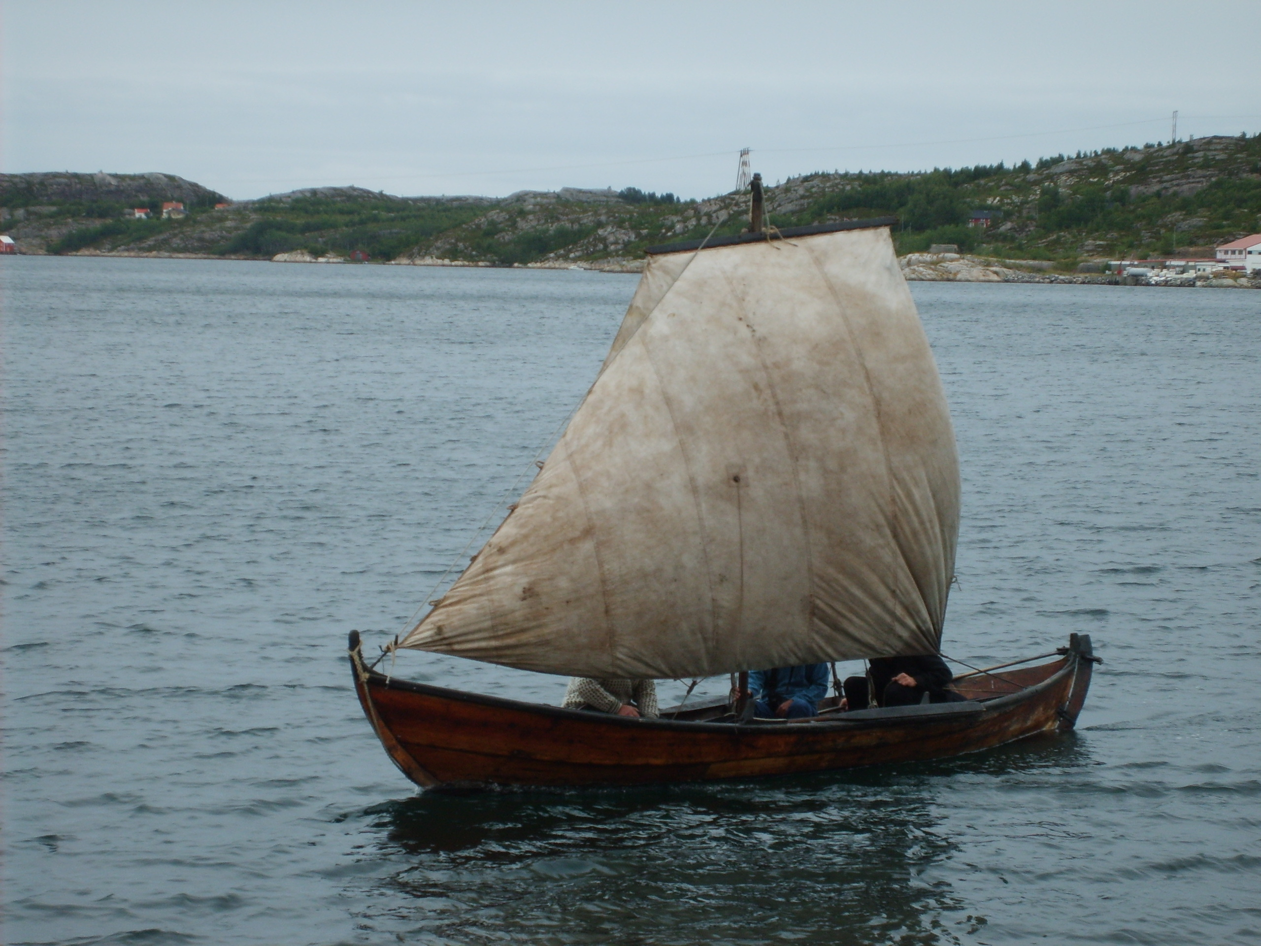 Geitbåt med aymmetrisk råsegl.